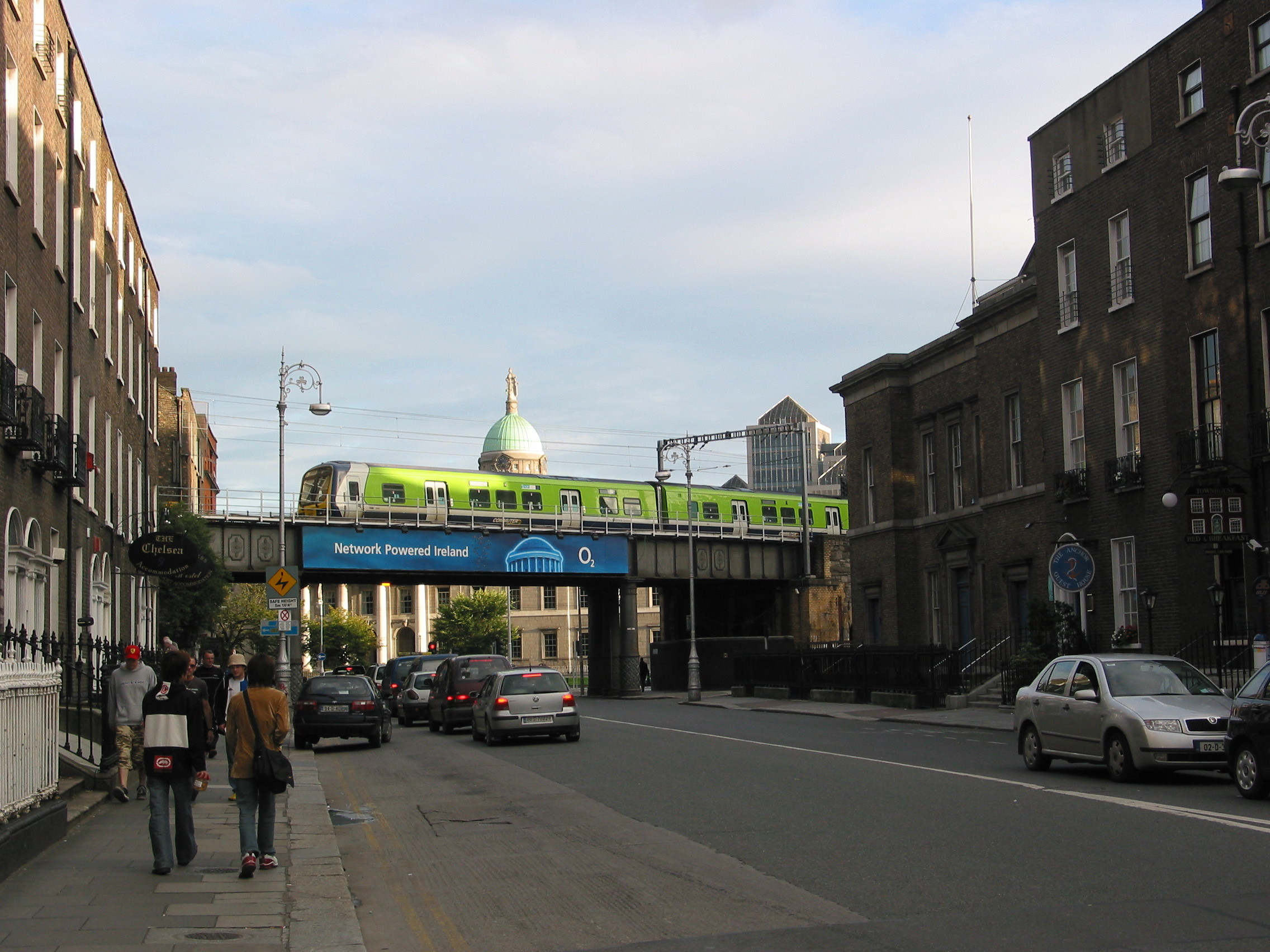 Gardiner Street, Dublin